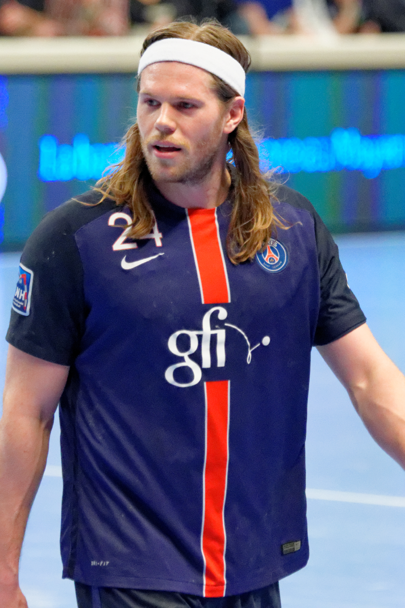 PSG Handball / Toulouse Fenix Handball lors de la 21e journée du championnat de France de handball masculin le 16 avril 2016 au stade Pierre de Coubertin à Paris.